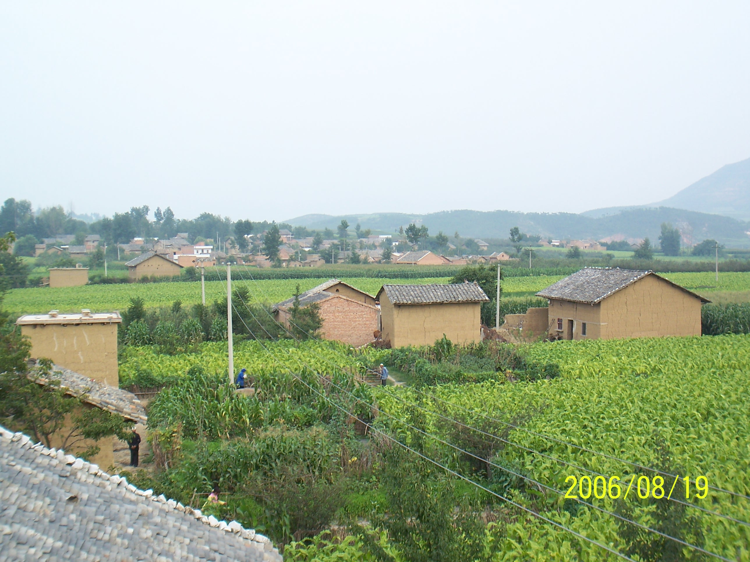 布嘎乡花鹿坪村